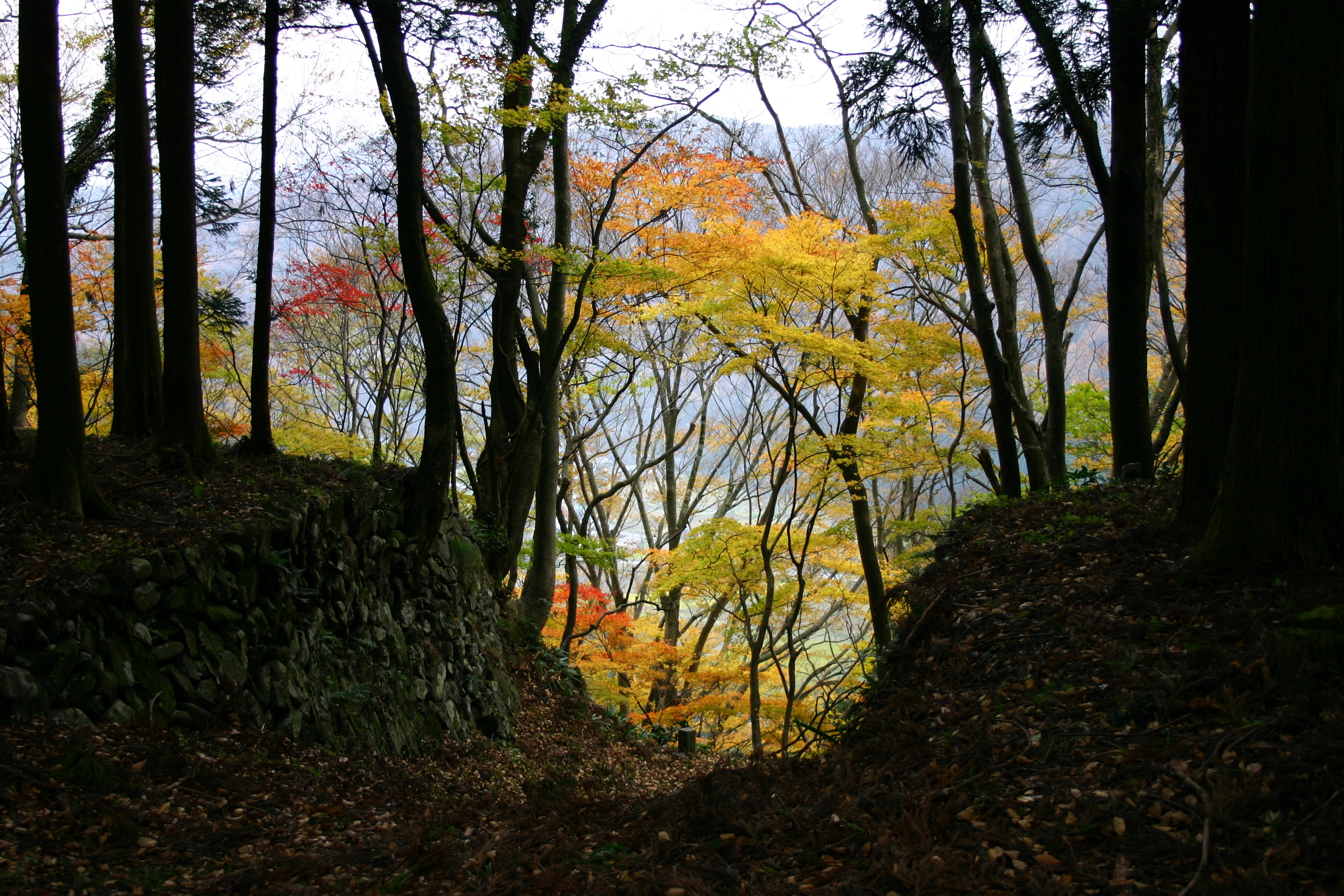 福井県南越前町の湯尾峠